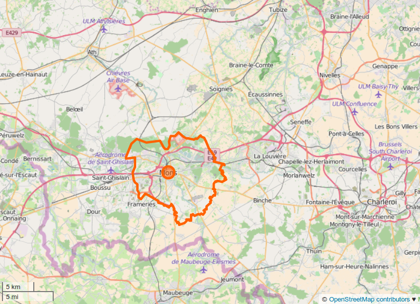 Situation de Mons en Belgique, OSM. This map may be incomplete, and may contain errors. Don't rely solely on it for navigation.